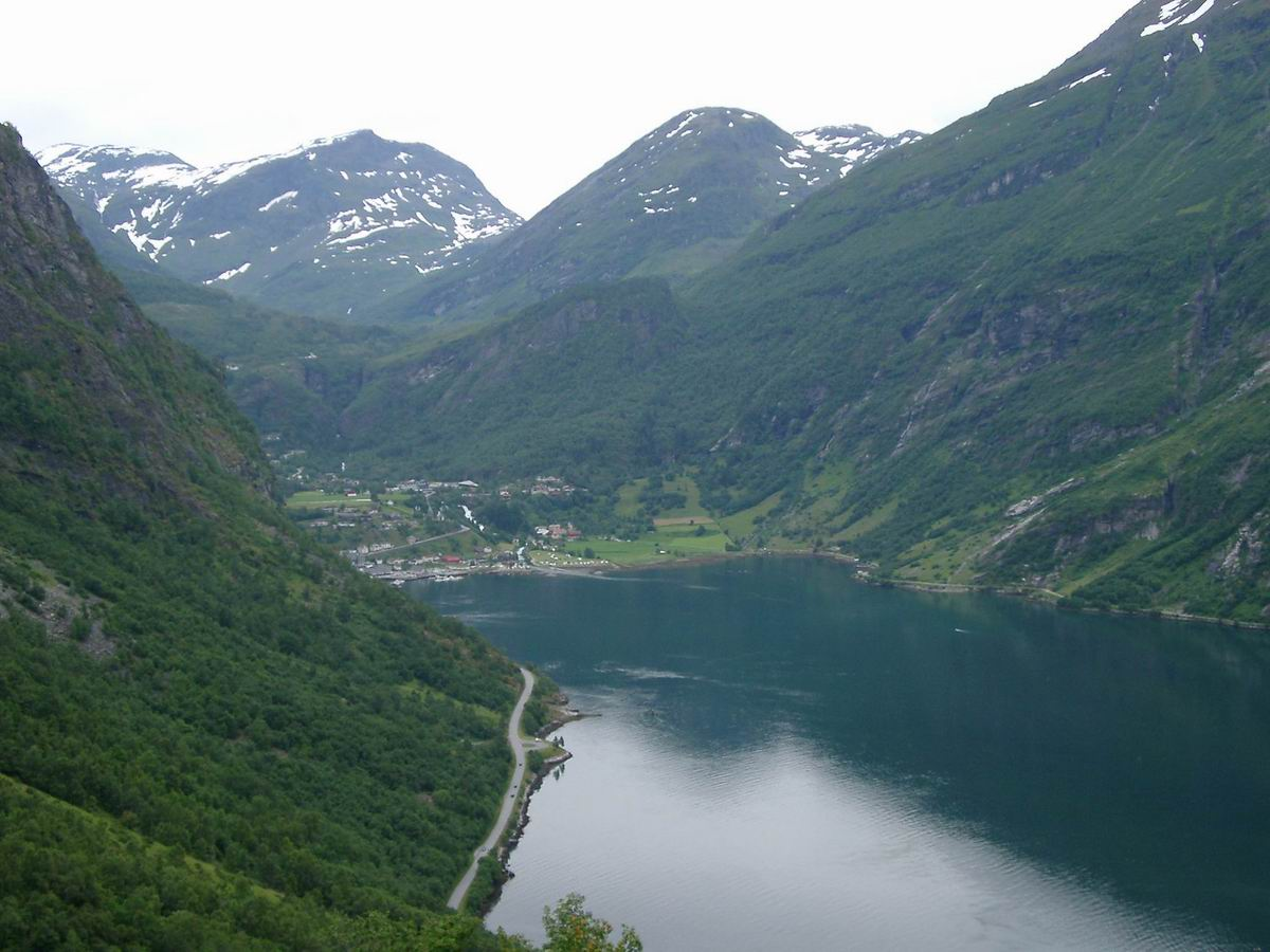 Geiranger Norwegen